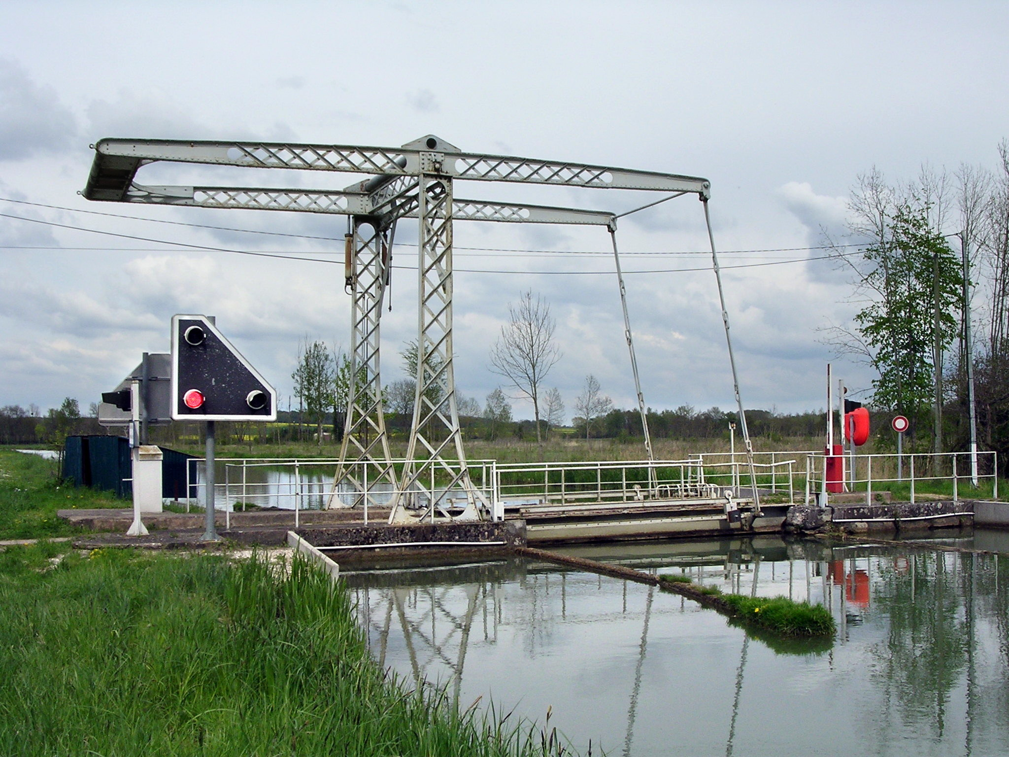 Cheuge (Côte-d'Or). Pont-levis sur le canal de la Marne à La Saône.